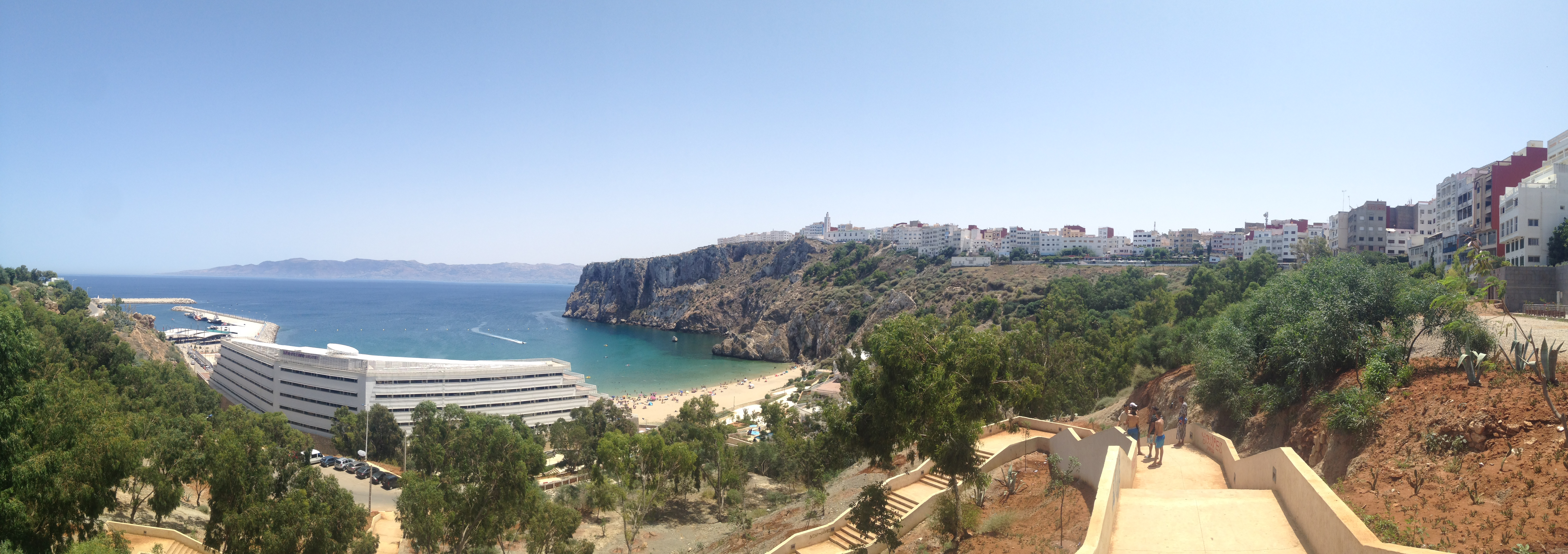 شاطئ كيماضو، الحسيمة